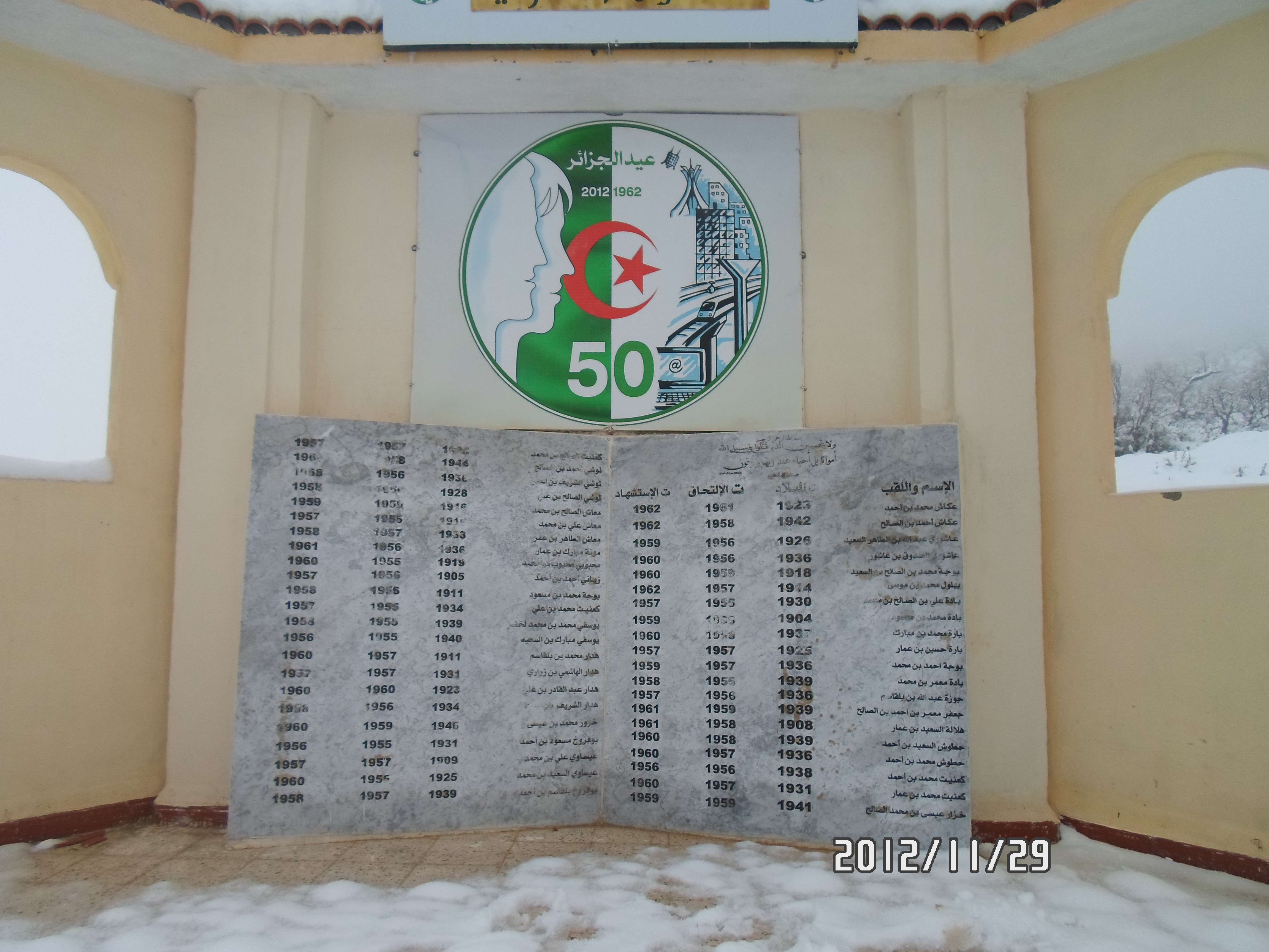 القائمة تحوى 44 شهيدا من ابناء لارباع